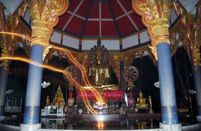 พระพุทธสันติสุขไพศาล อุดมมงคลจักรวาฬประสิทธิ์ ประดิษฐาน ที่ ถาวรเจติยมหาวิหาร ณ ลานธรรมสภา วัดบ้านเก่าบ่อ